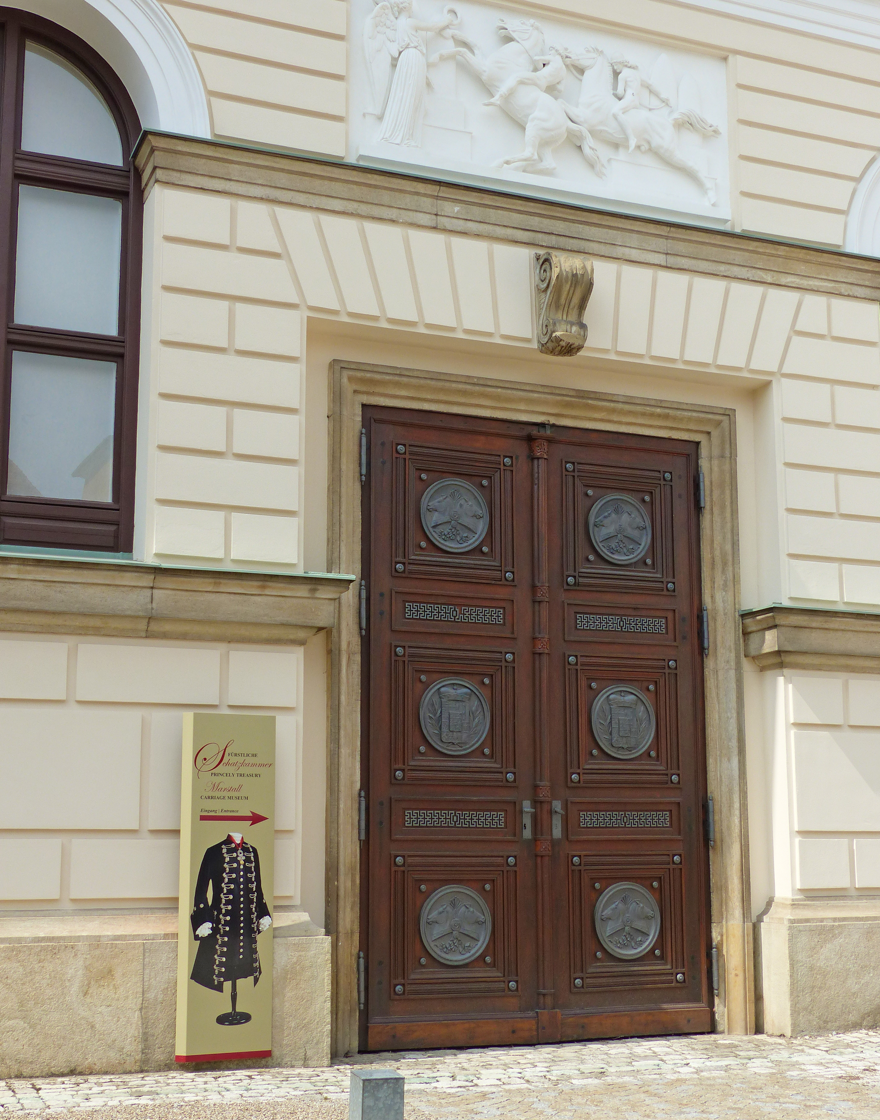 Marstall von Schloss St. Emmeram in RegensburgThis is a photograph of an architectural monument.